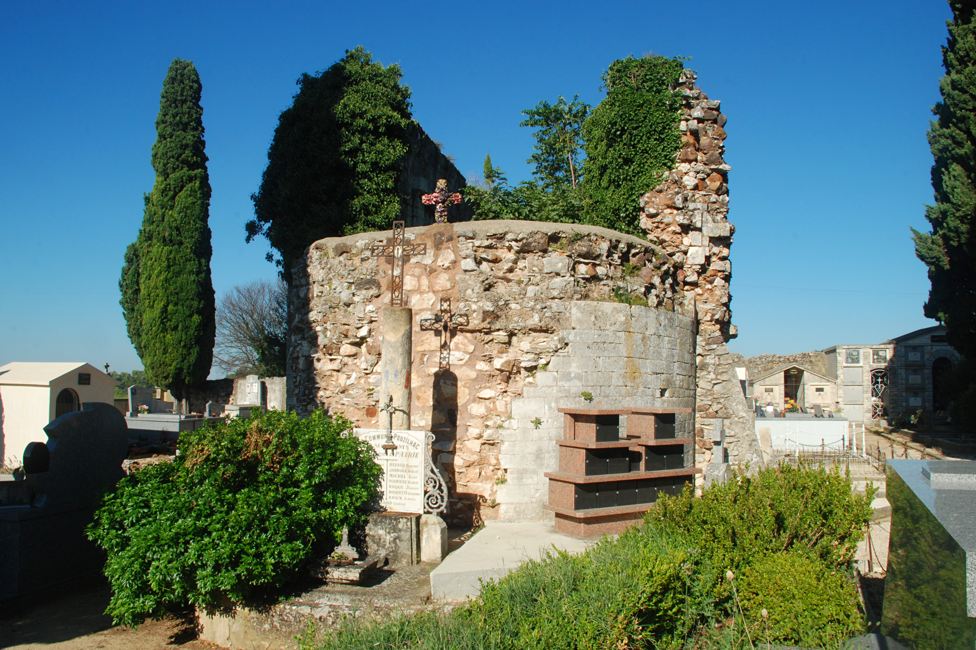 France - Gard - Chapelle Saint-Privat de Pouzilhac